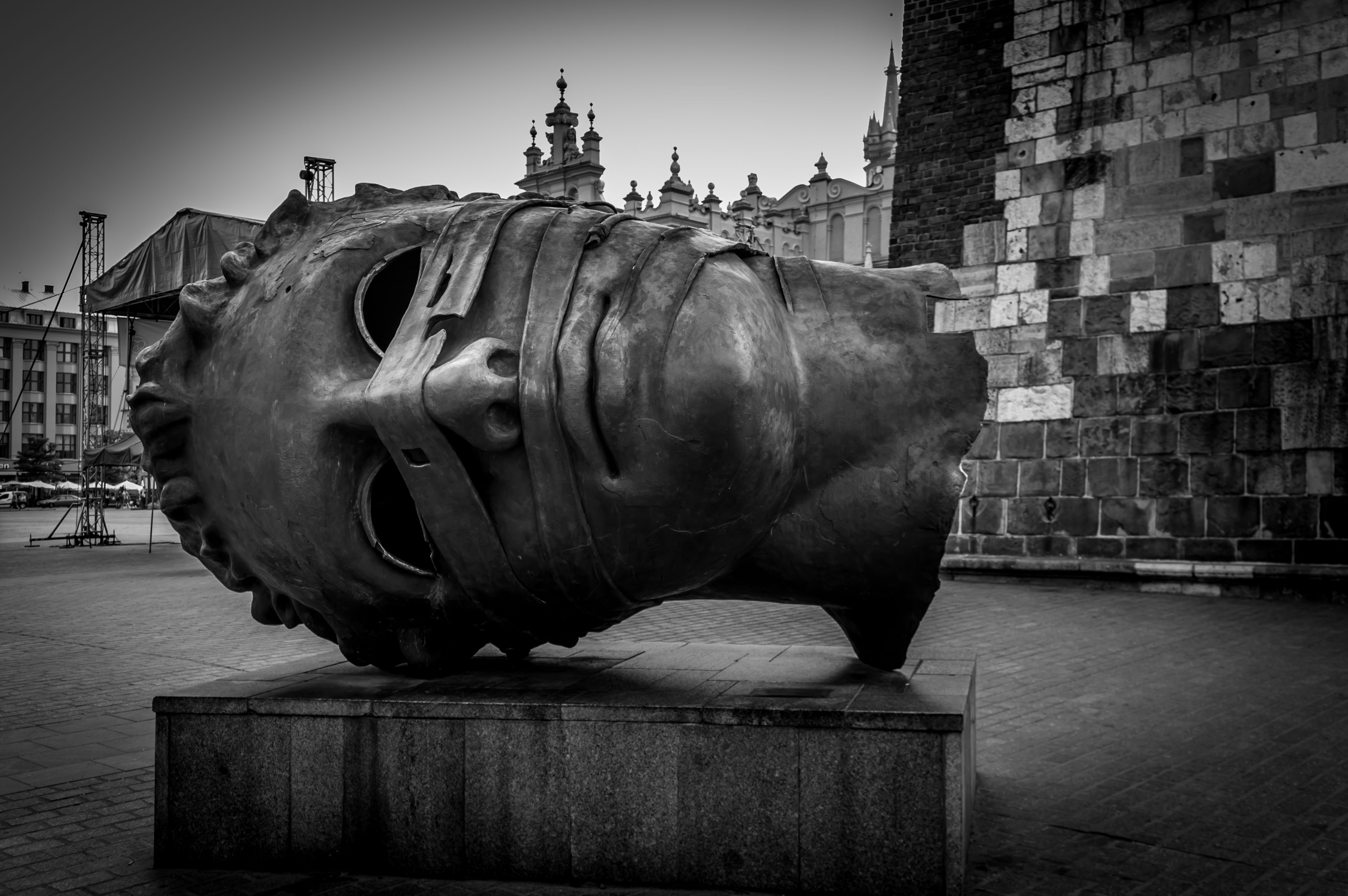 Estátua situada no Rynek Glowny, Igor Mitoraj era um artista Polaco nascido em Oederan, Germany, faleceu em Paris aos 70 anos ( 6 de Outubro de 2014 )